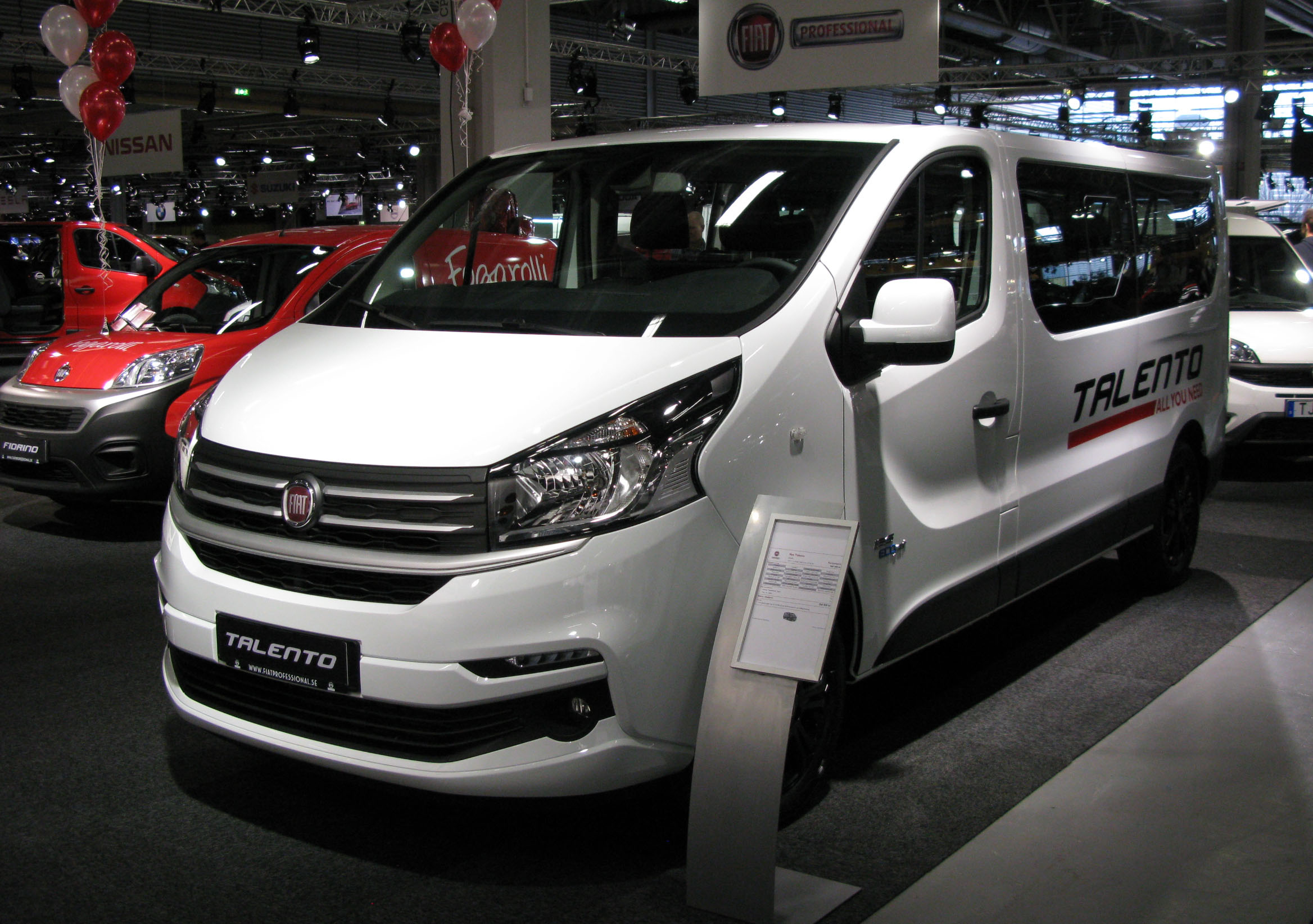 2017 Fiat Talento